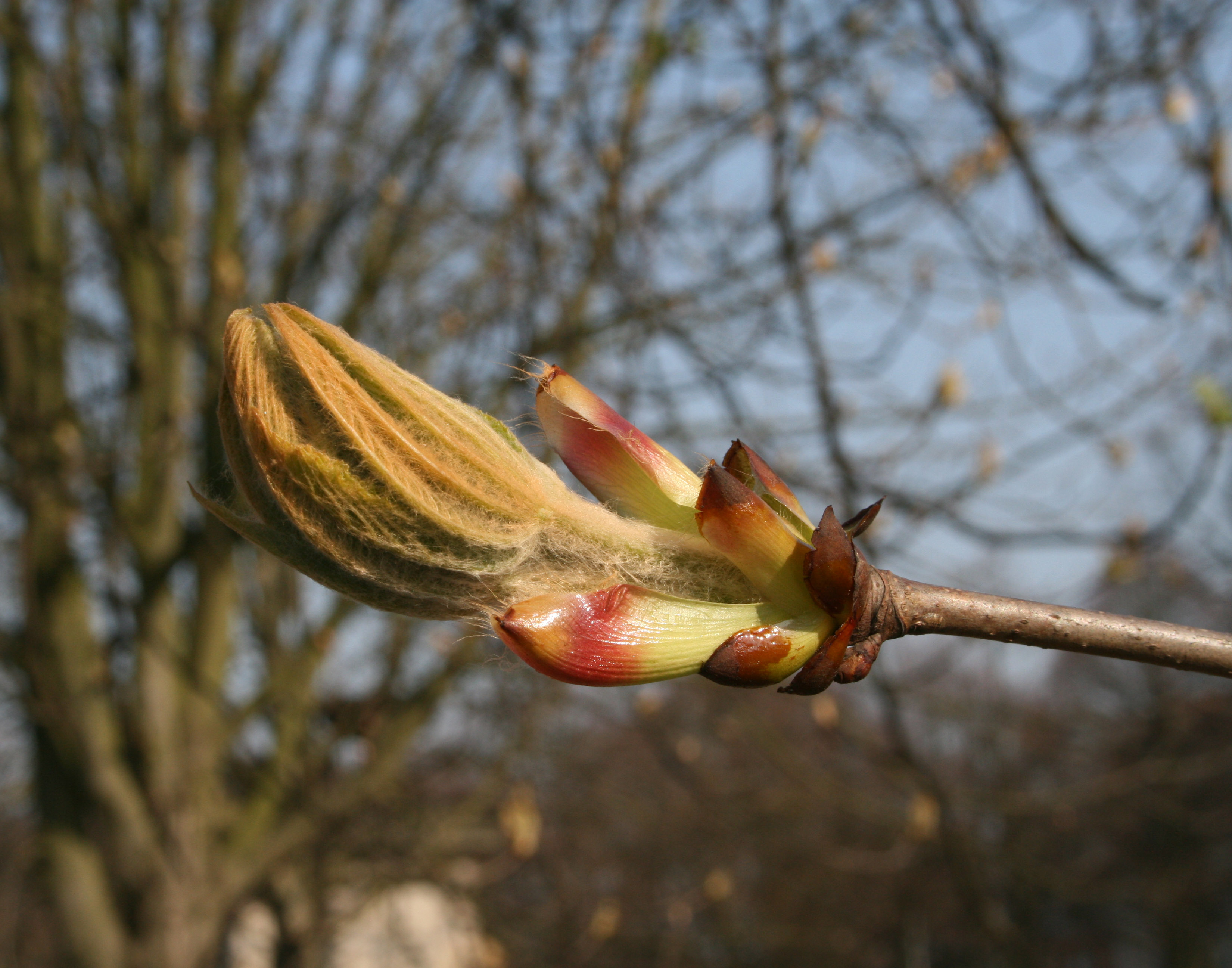 Bourgeon de marronnier Cf Aesculus hippocastanum